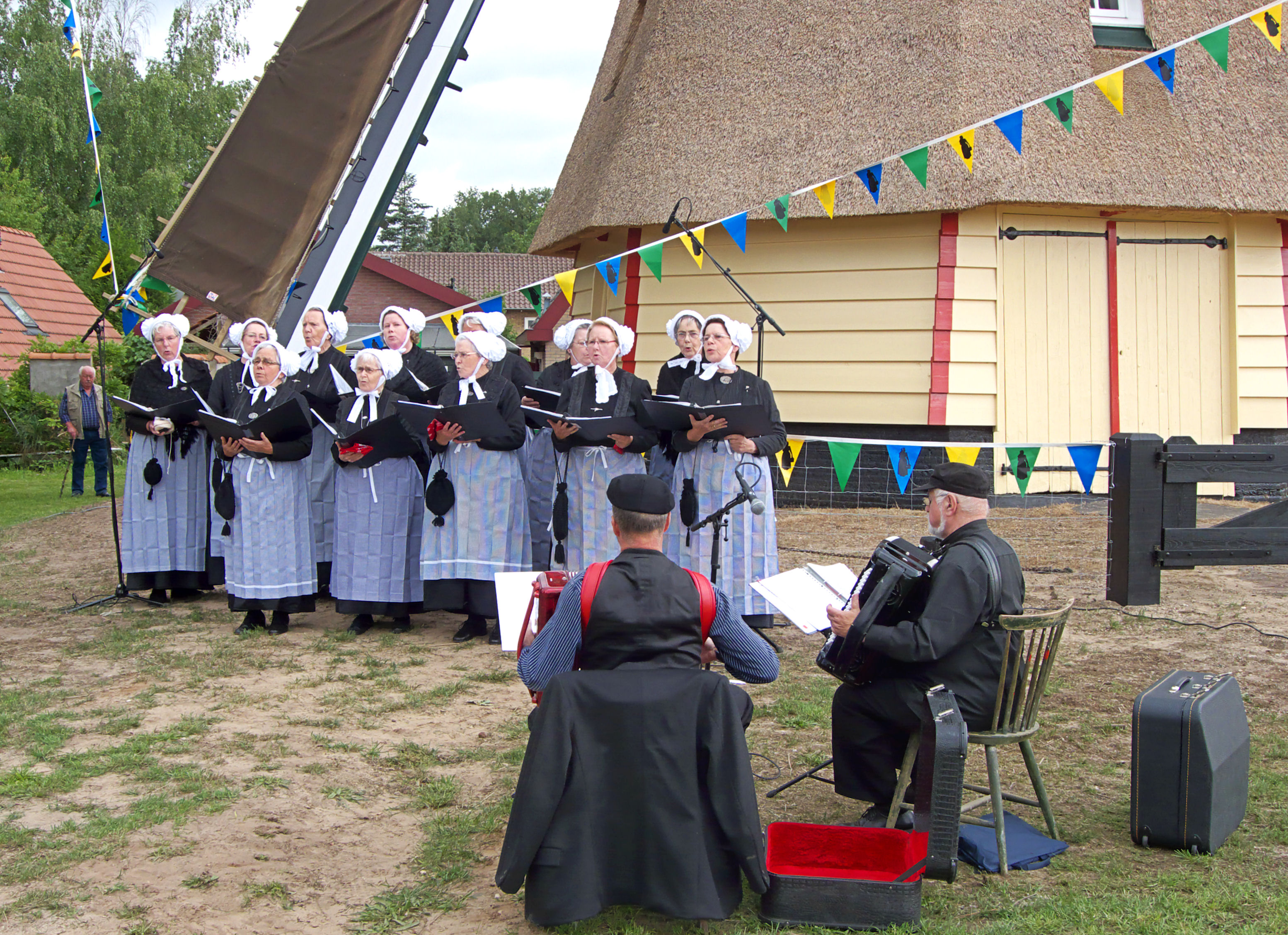 Molen De Hoop, Lunteren, folklore groep Lunthari